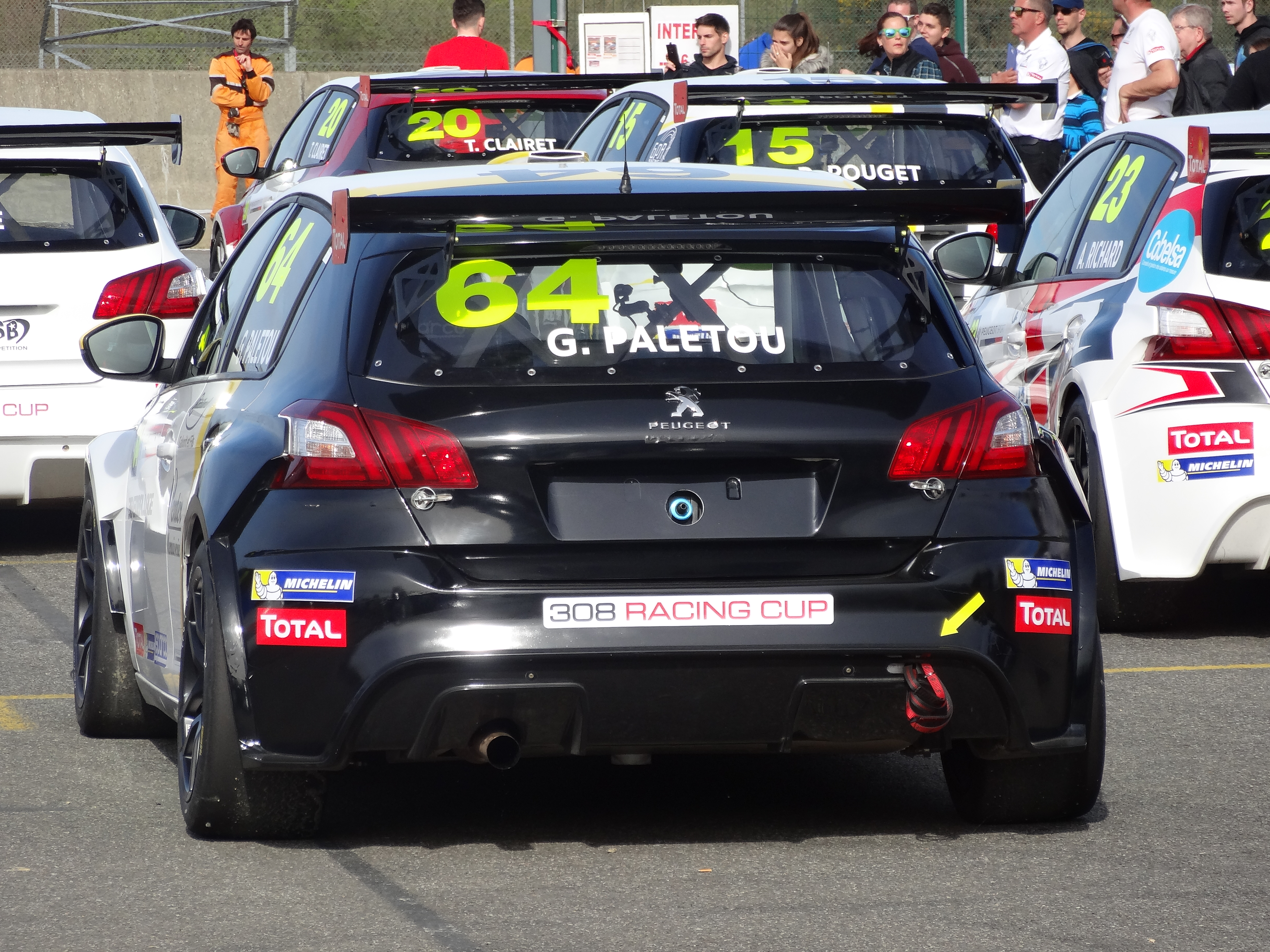 51e Coupes de Pâques (sport automobile), sur le Circuit Paul Armagnac à Nogaro (Gers) : Peugeot 308 Racing Cup.